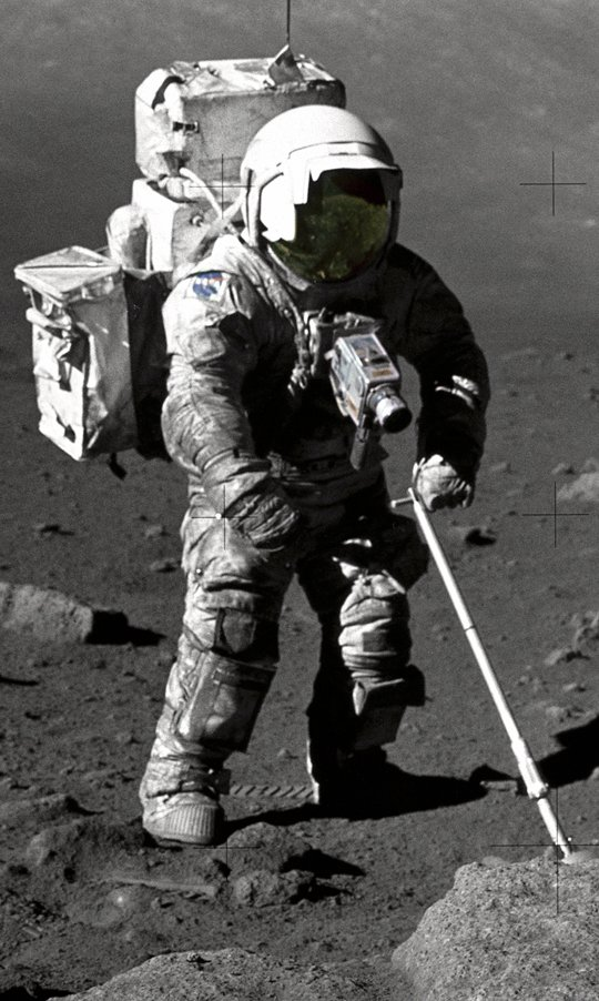 Apollo 17 - Schmitt bei der Arbeit